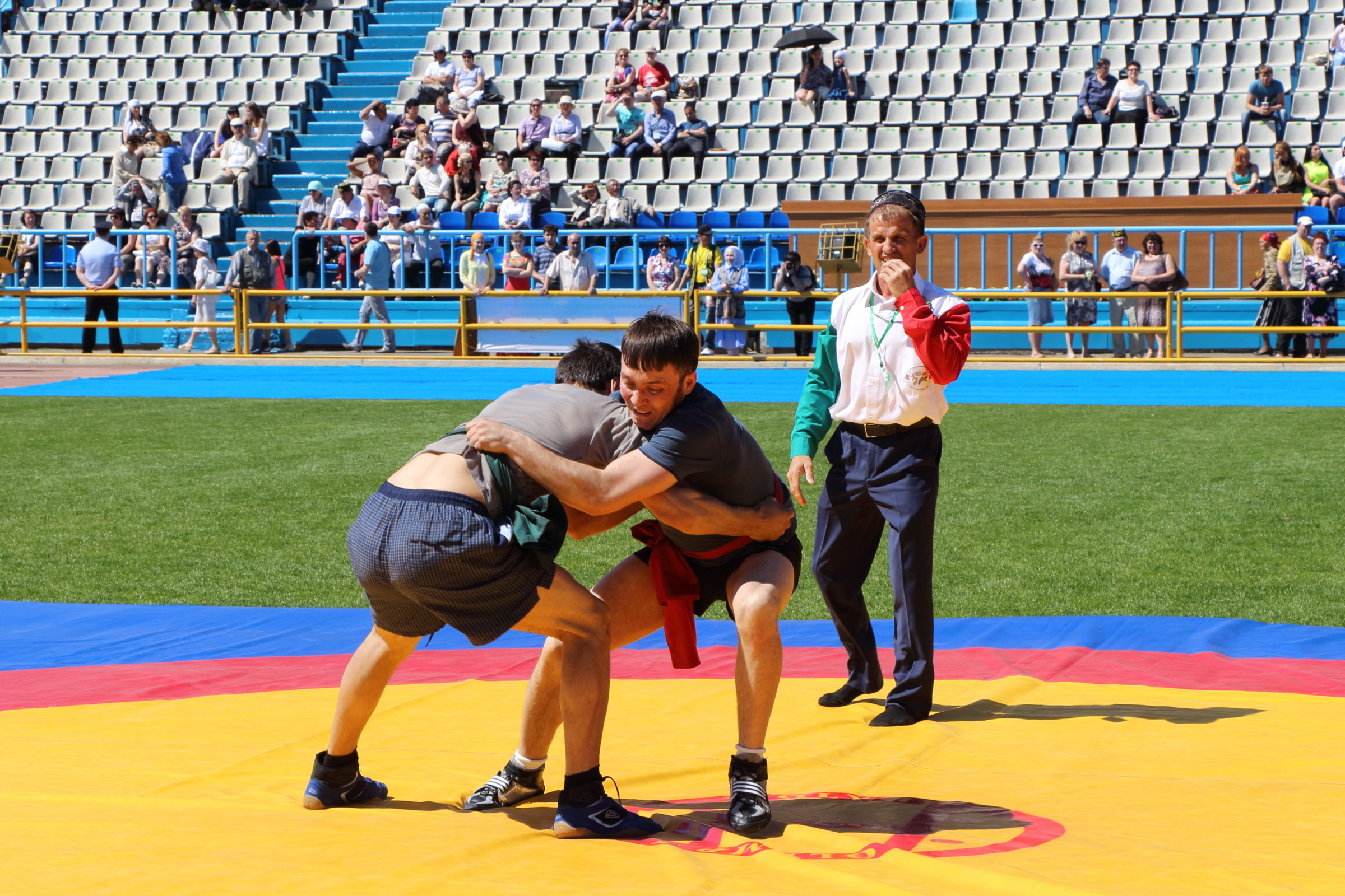 Куреш на Сабантуе в Томске, 2014 г.